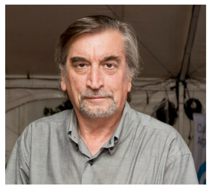 Disertación de Edgardo Mocca en el lanzamiento del libro Antología de manifiestos políticos argentinos (1890-1956), tomo 1.